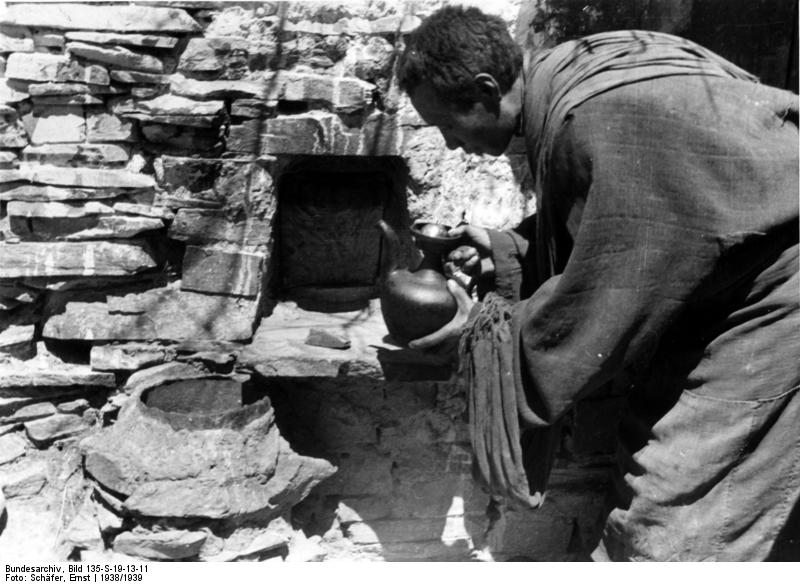 Gyantse, Einsiedlerkloster